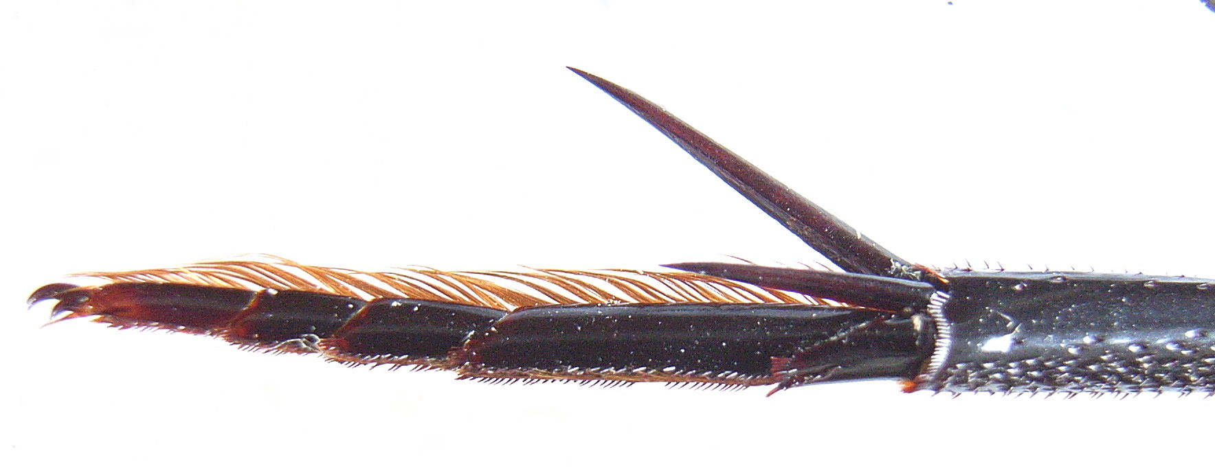 Hydrous piceus middle tarsus